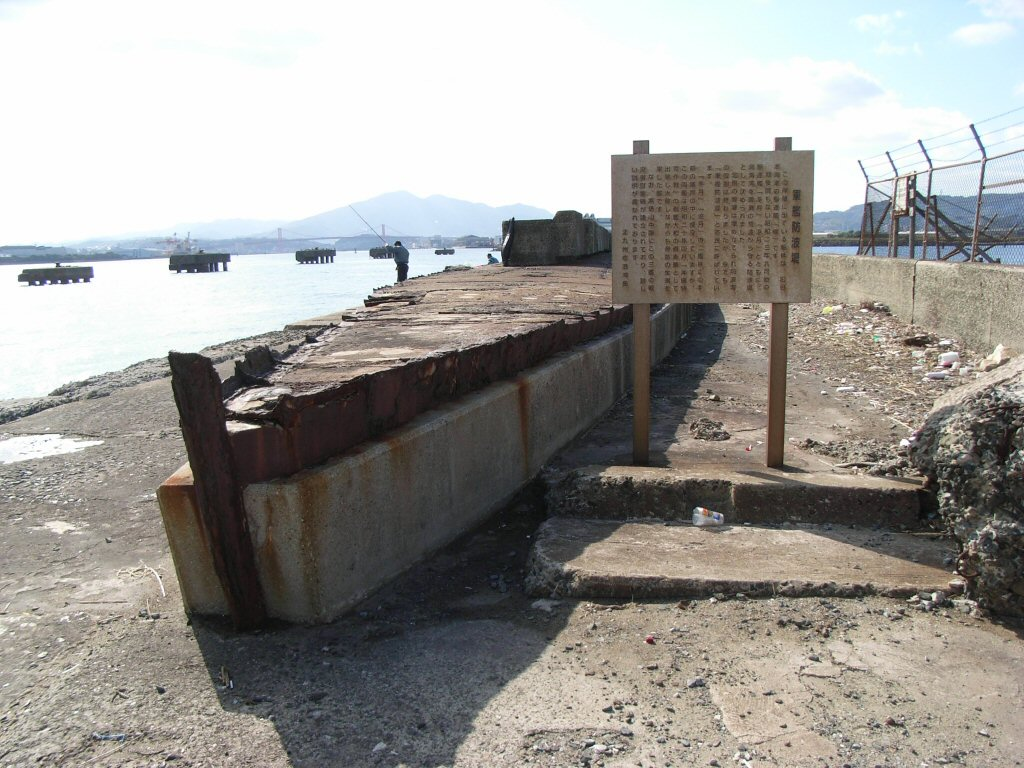 北九州市若松区の軍艦防波堤に今も残る柳（初代）の船体です。 [1] [2]